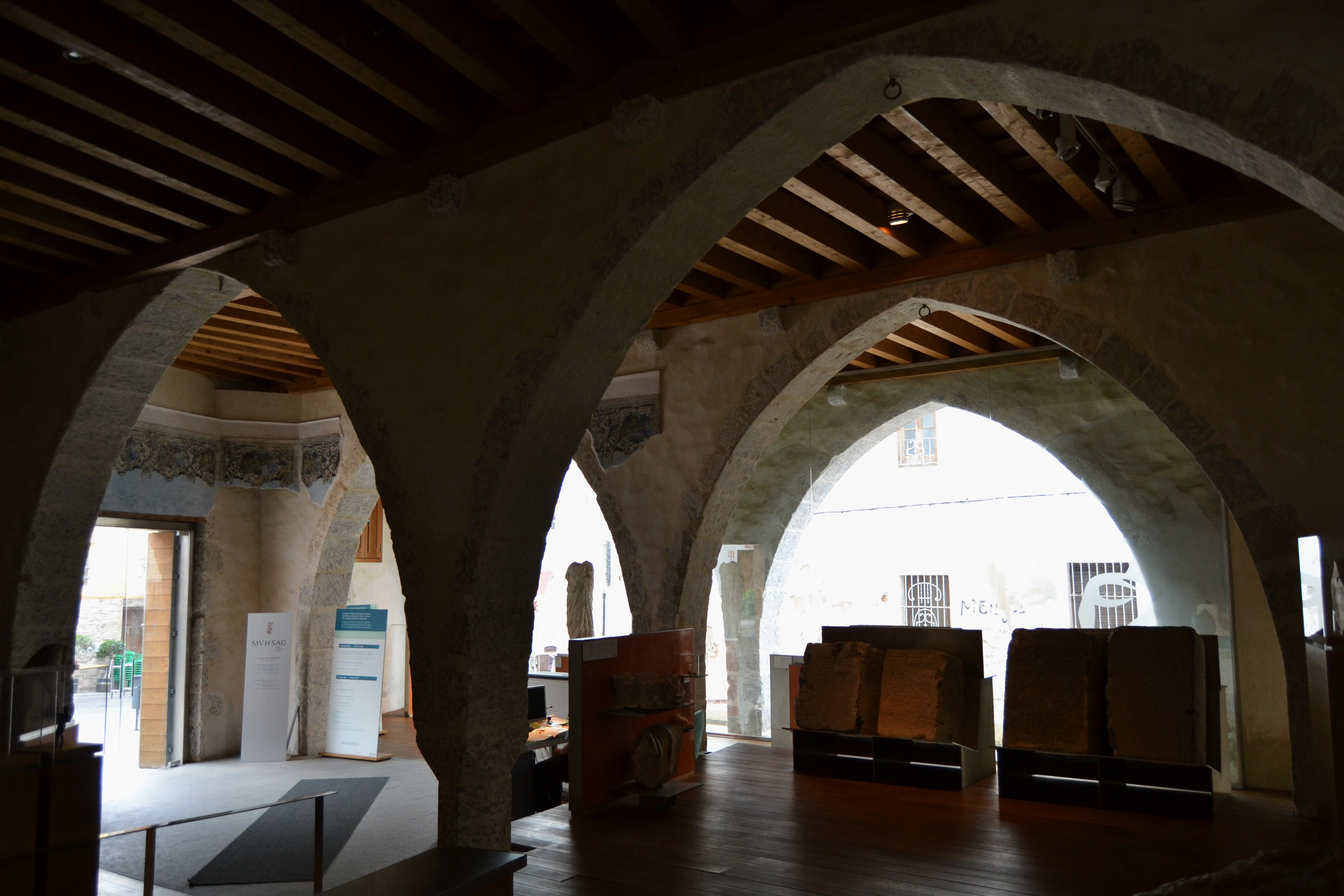 Interior del MUHSAG - Museu Històric de Sagunt.